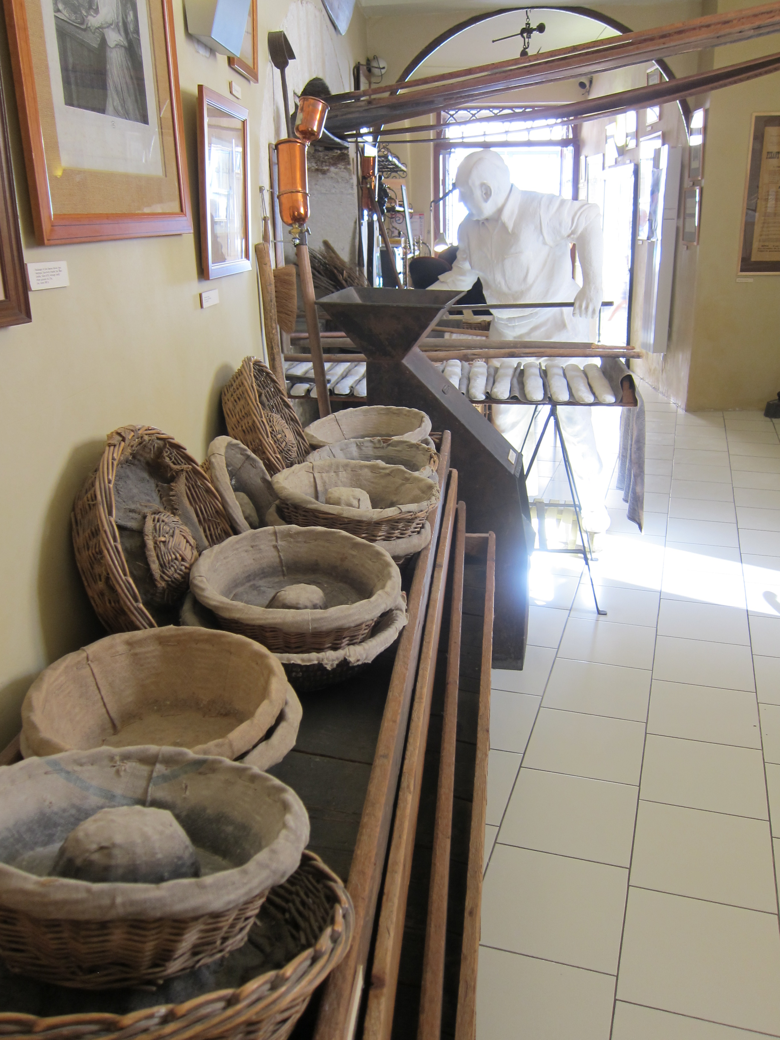 Boulangerie Museum